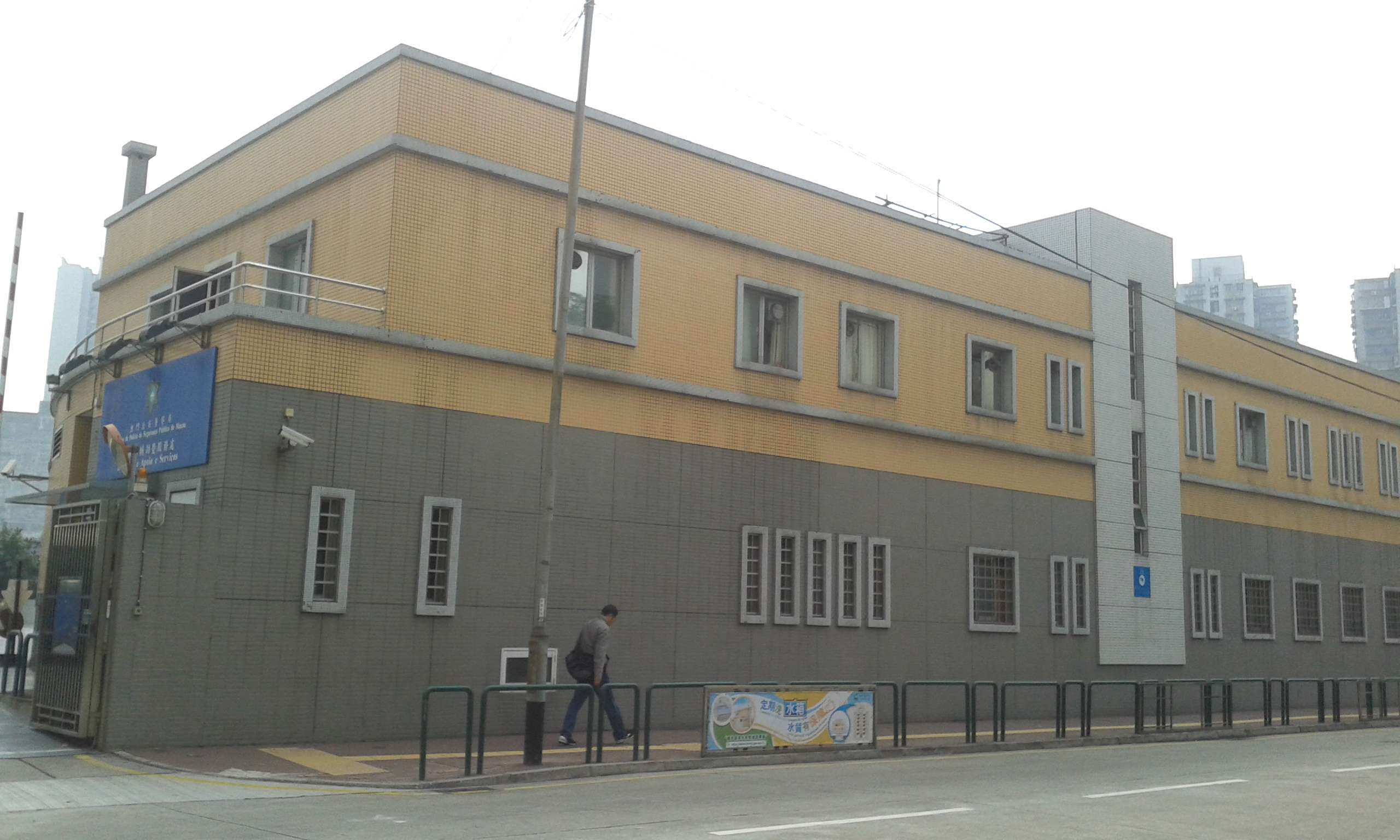 澳門治安警察局第二警局處